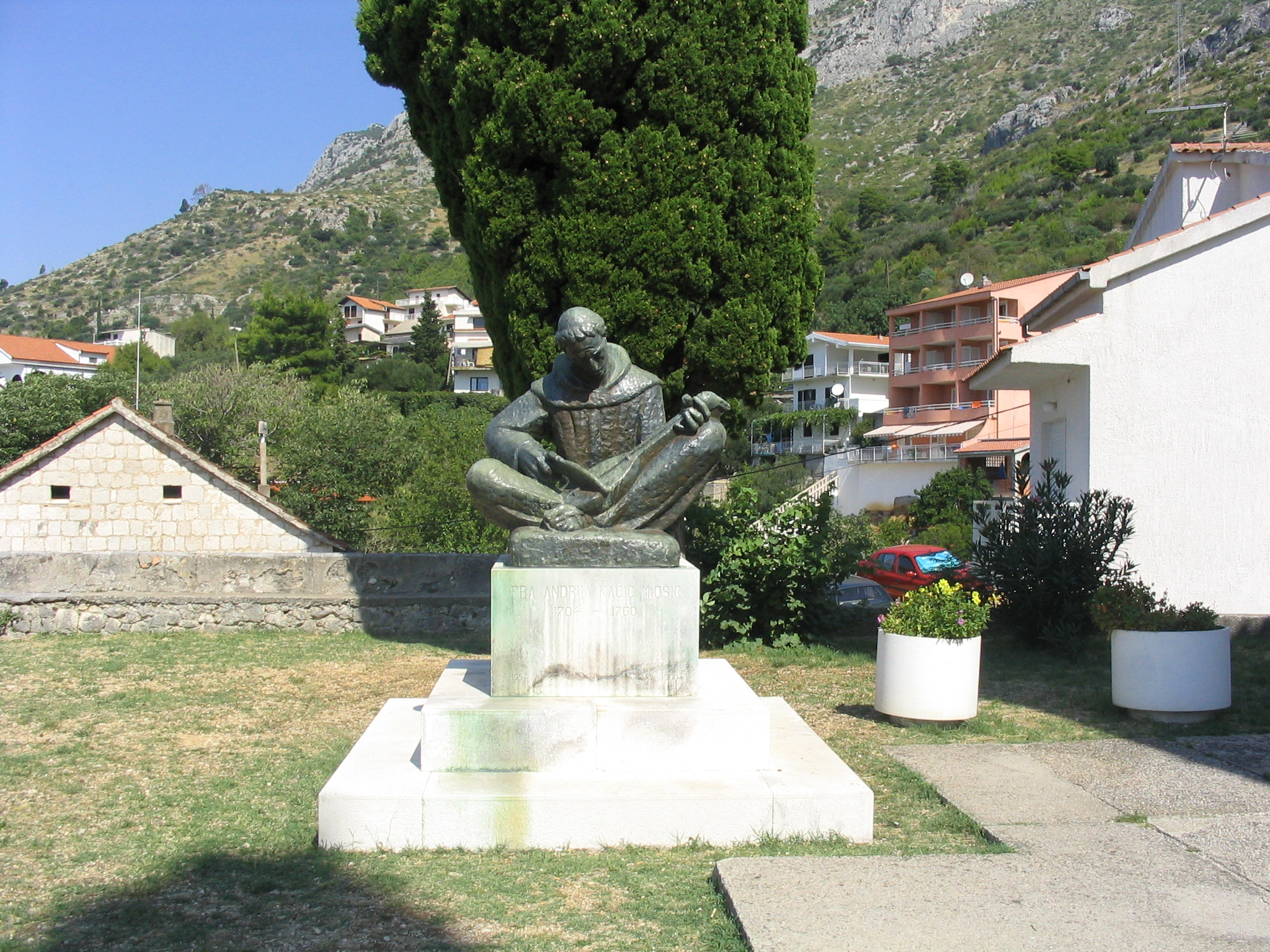 Denkmal des Dichters Andrija Kačić Miošić an der Kirche in Brist. Aufgenommen am 24.08.2006 von Dr. Hagen Graebner